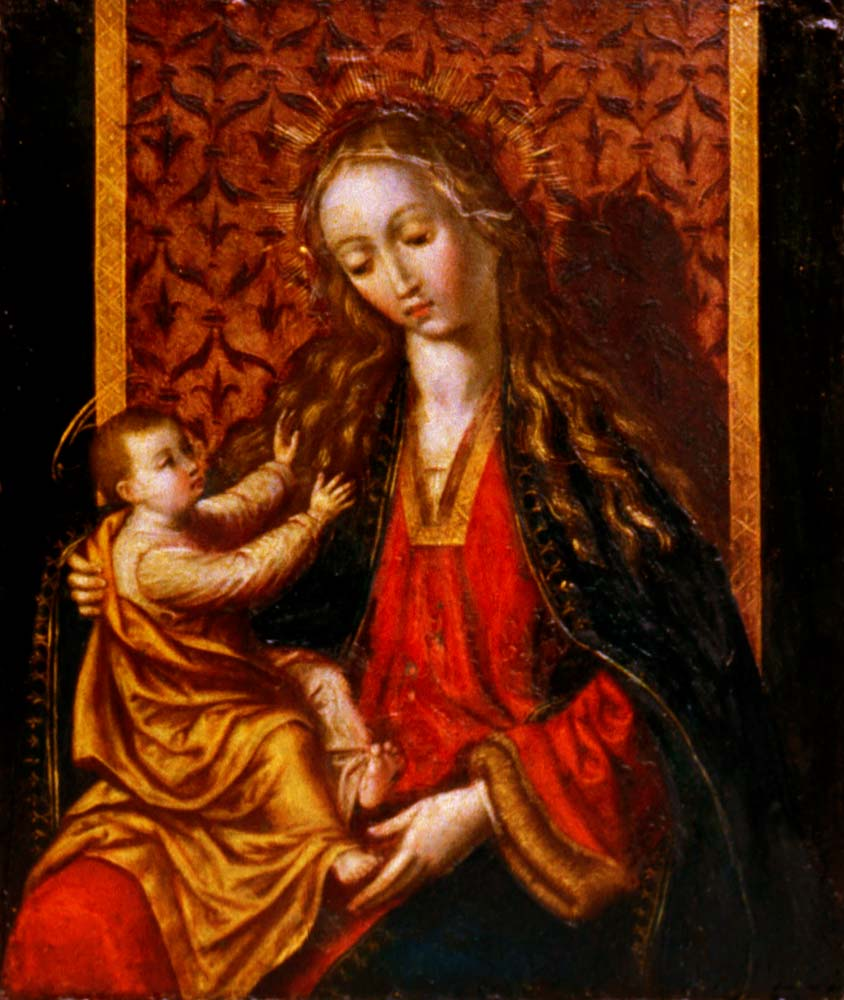 La Virgen y el Niño con santos jesuitas; tabla central de un tríptico con los santos Ignacio de Loyola, Francisco de Borja, Francisco Javier y Estanislao de Kotska, los tres primeros todavía como venerables. La Paz (Bolivia), Museos municipales